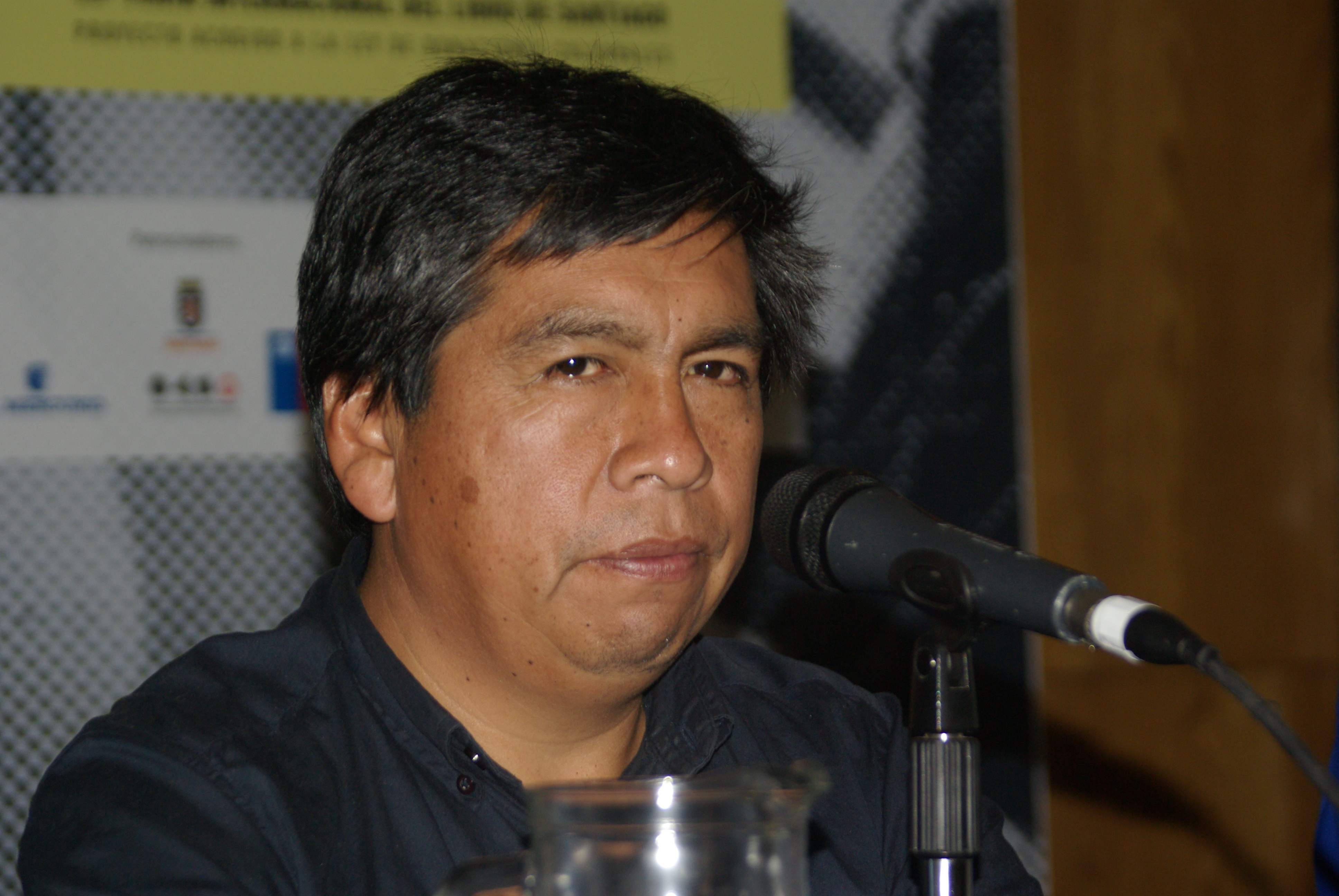 El poeta mapuche chileno Leonel Lienlaf en la Feria Internacional del Libro de Santiago 2015